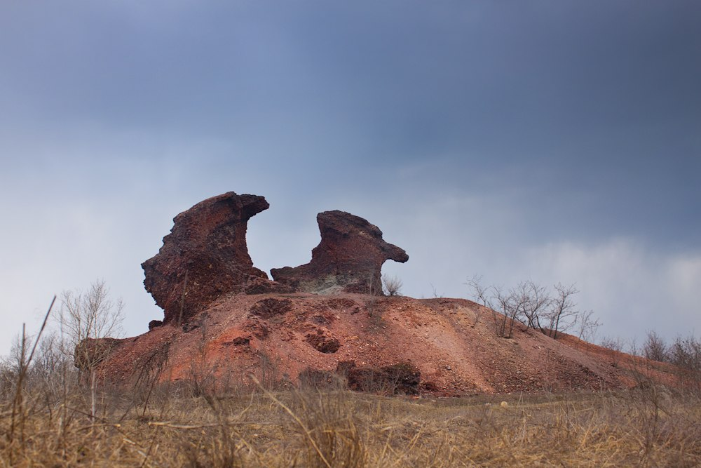 Достопримечательность и главный символ Червоногвардейского района г. Макеевки